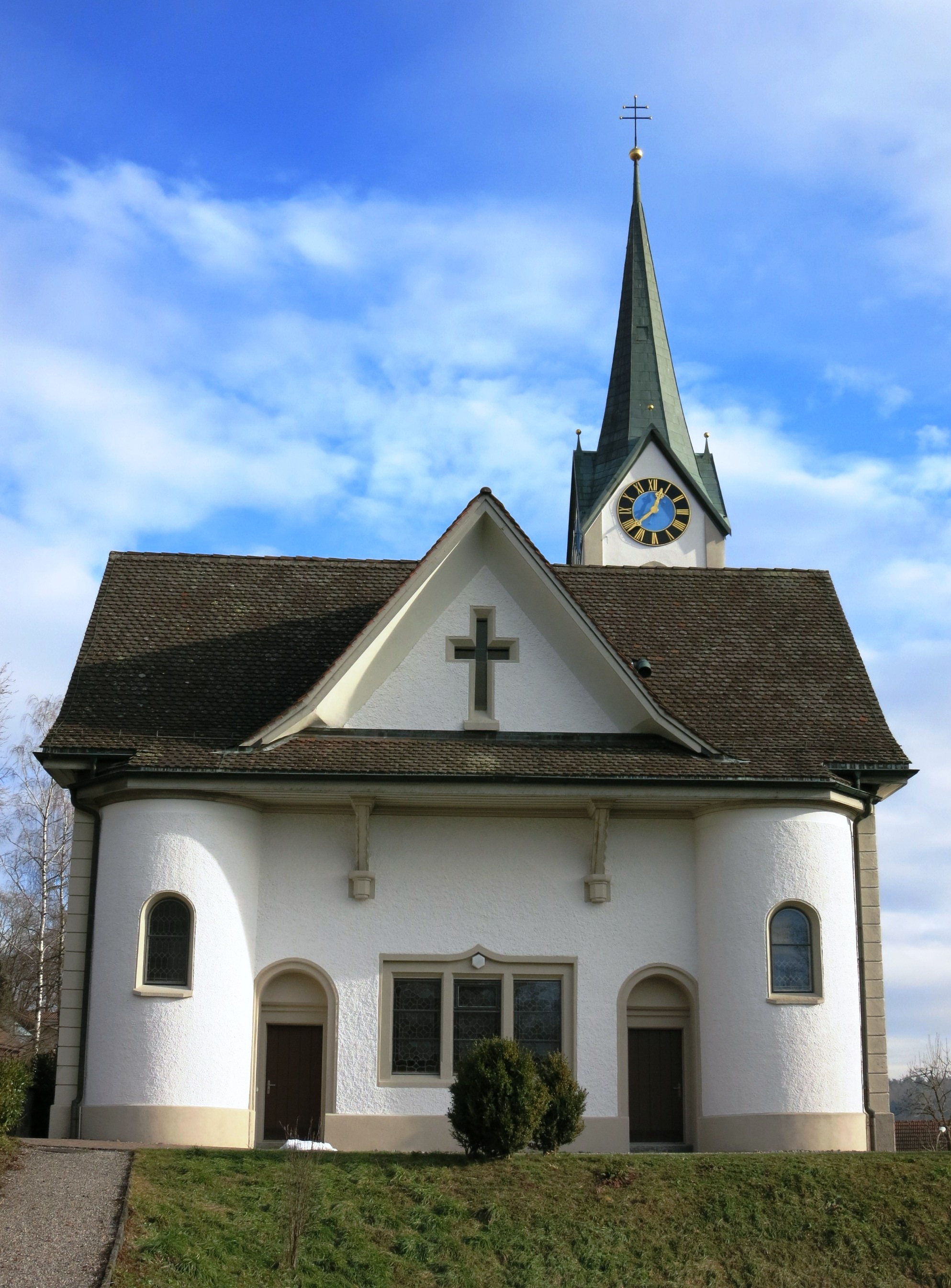 Kirche, Schneisingen AG, Schweiz